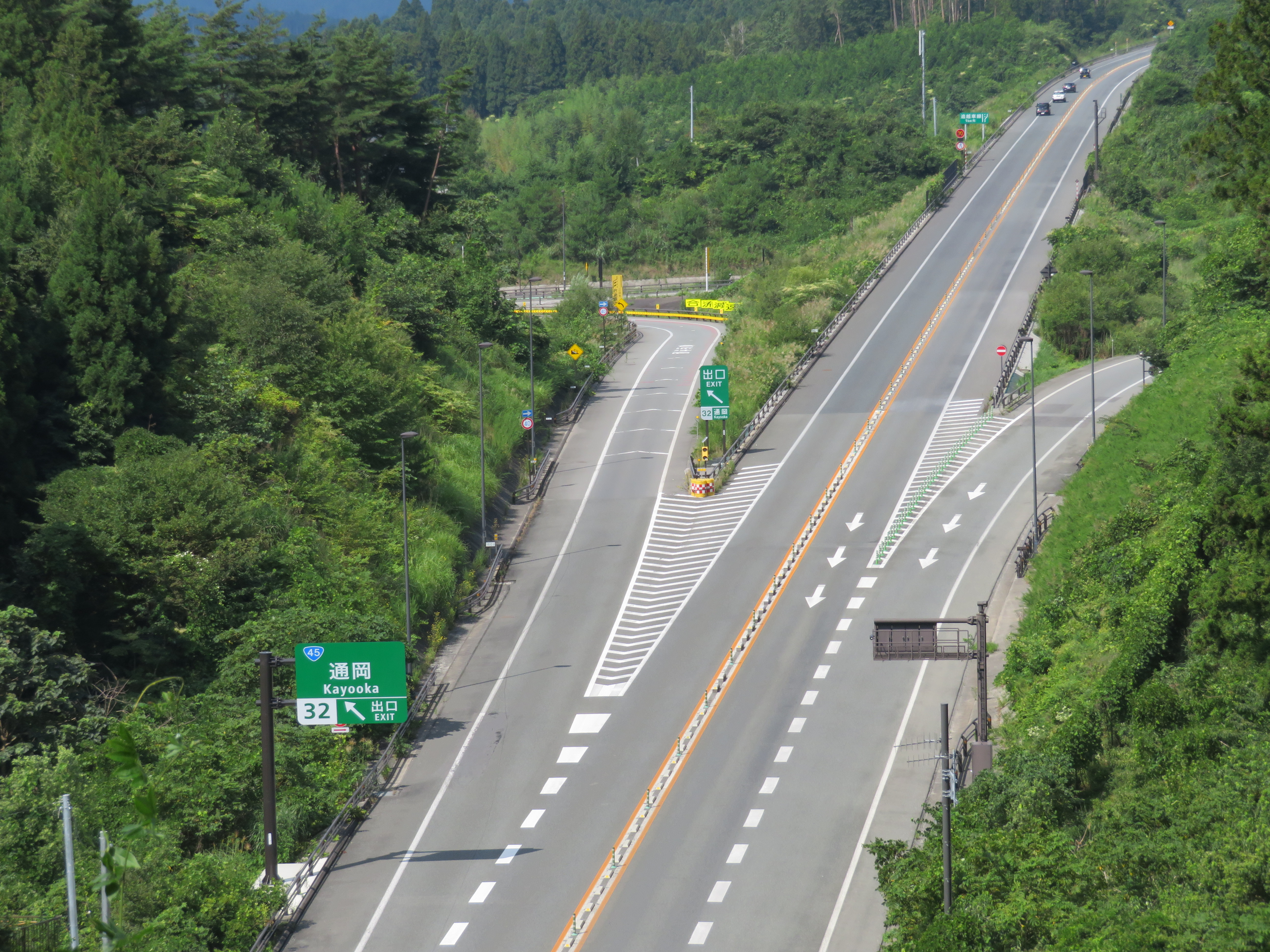 三陸自動車道 通岡インターチェンジ出入口付近